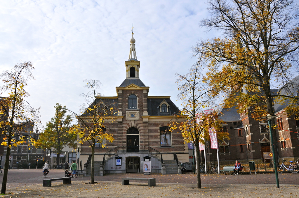 Gevestigd in het voormalige raadhuis aan de Kerkbrink. Het gebouw dateert uit 1881. Gemeente-architect J. Rietbergen verbouwde toen het raadhuis zodat het groter werd en een deftiger uitstraling kreeg. In 1988 werd het gerestaureerd en kreeg het een museale functie. Bron